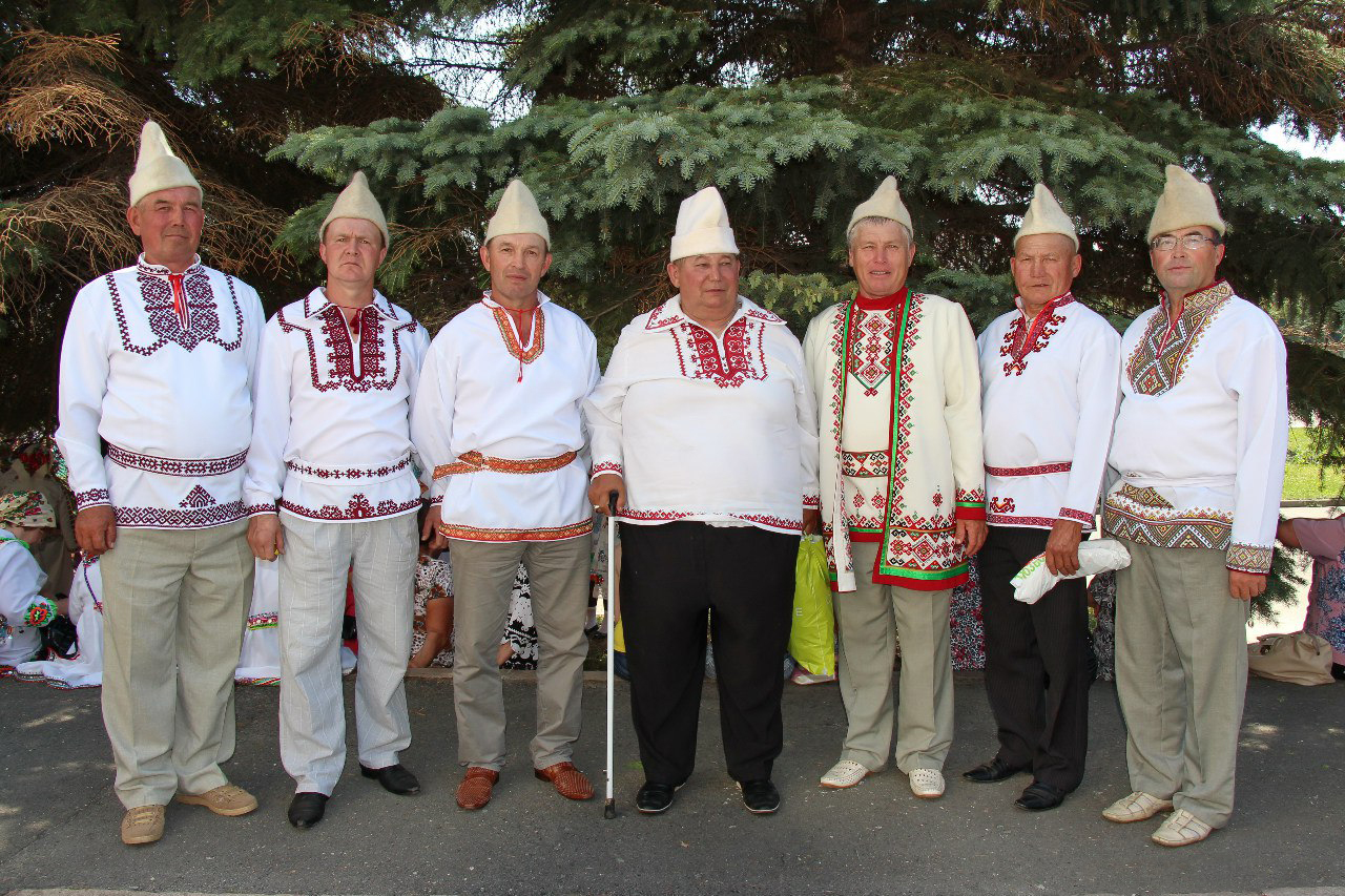 Карты - служители (жрецы) традиционной марийской религии